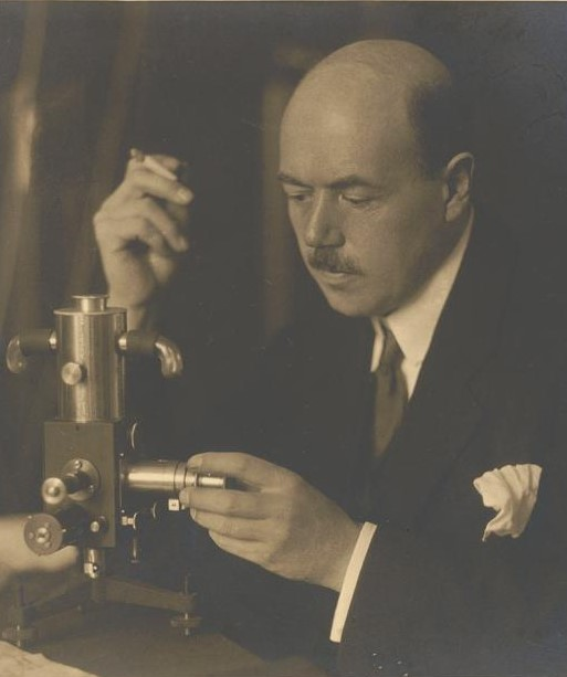 Porträt des Physikers Edgar Meyer, Foto von Franz Schmelhaus, [1910]. Silbergelatineabzug; 10,8 x 13,7 cm. Zentralbibliothek Zürich, Meyer, Edgar I, 1.